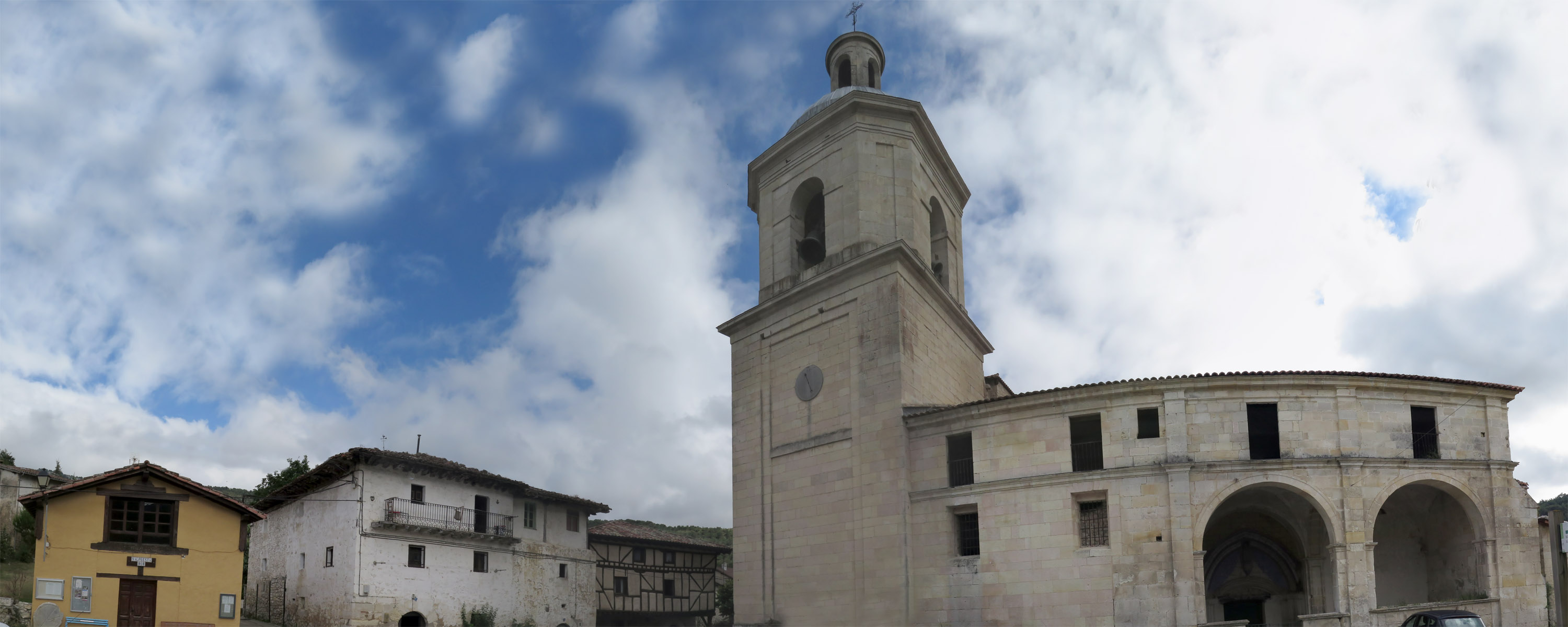 Colegiata y pueblo de Valpuesta (provincia de Burgos), en los valles de San Zadornil y Valdegovía.